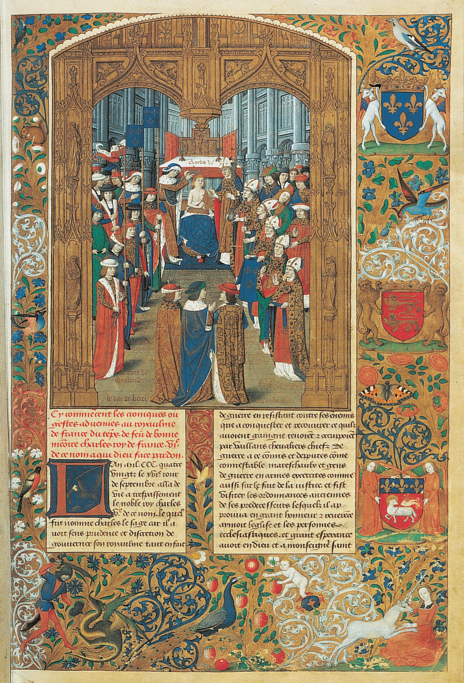 Enluminure représentant le sacre de Charles VI. Paris, BNF, manuscrit Français 2596, Chroniques de Charles VI et Charles VII, fol. 5.